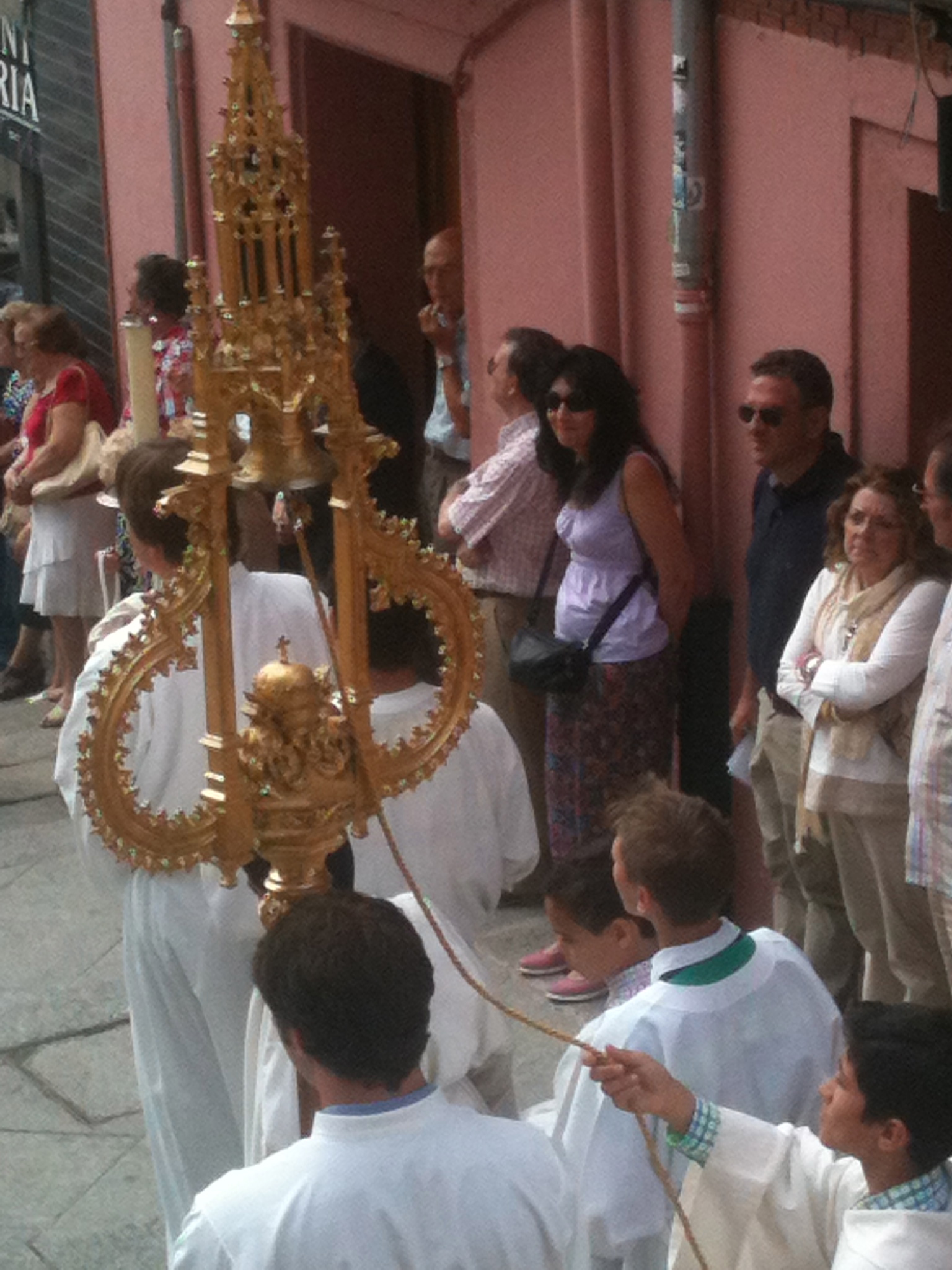 Corpus Christi. Calle Cadena y Eleta, Burgos, 2014. Tintinábulo